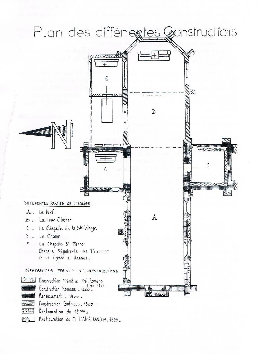 Plan de surface de l'église (dessin au crayon)